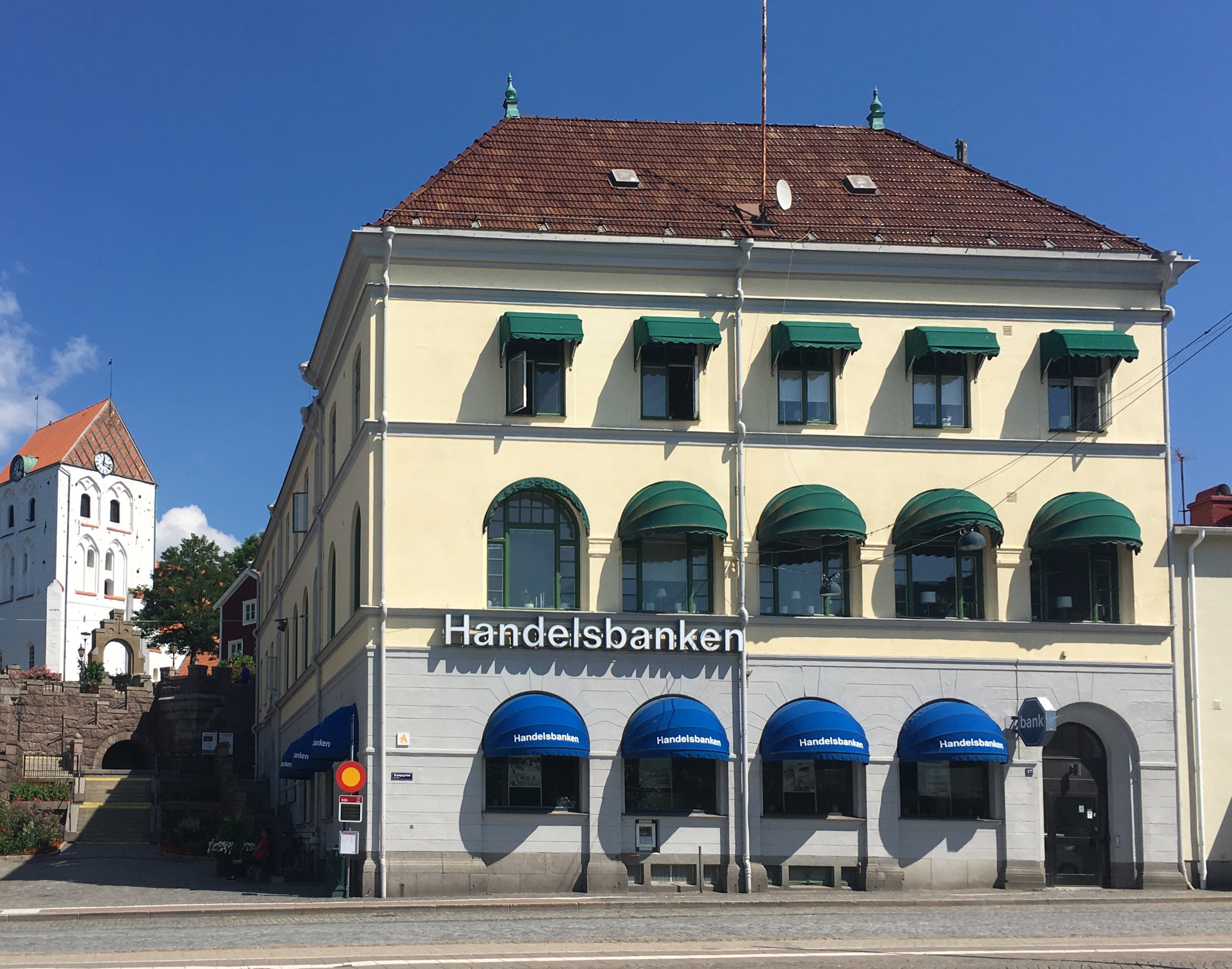 Svenska Handelsbanken till höger om Munktrappan i Ronneby. Byggnaden uppfördes 1907–09 för Bankaktiebolaget Södra Sverige. Arkitekt var Ola Anderson. Omfattande ombyggnad (även exteriört) 1940–43 av Kjell Westin. I bakgrunden syns Heliga Kors kyrka.